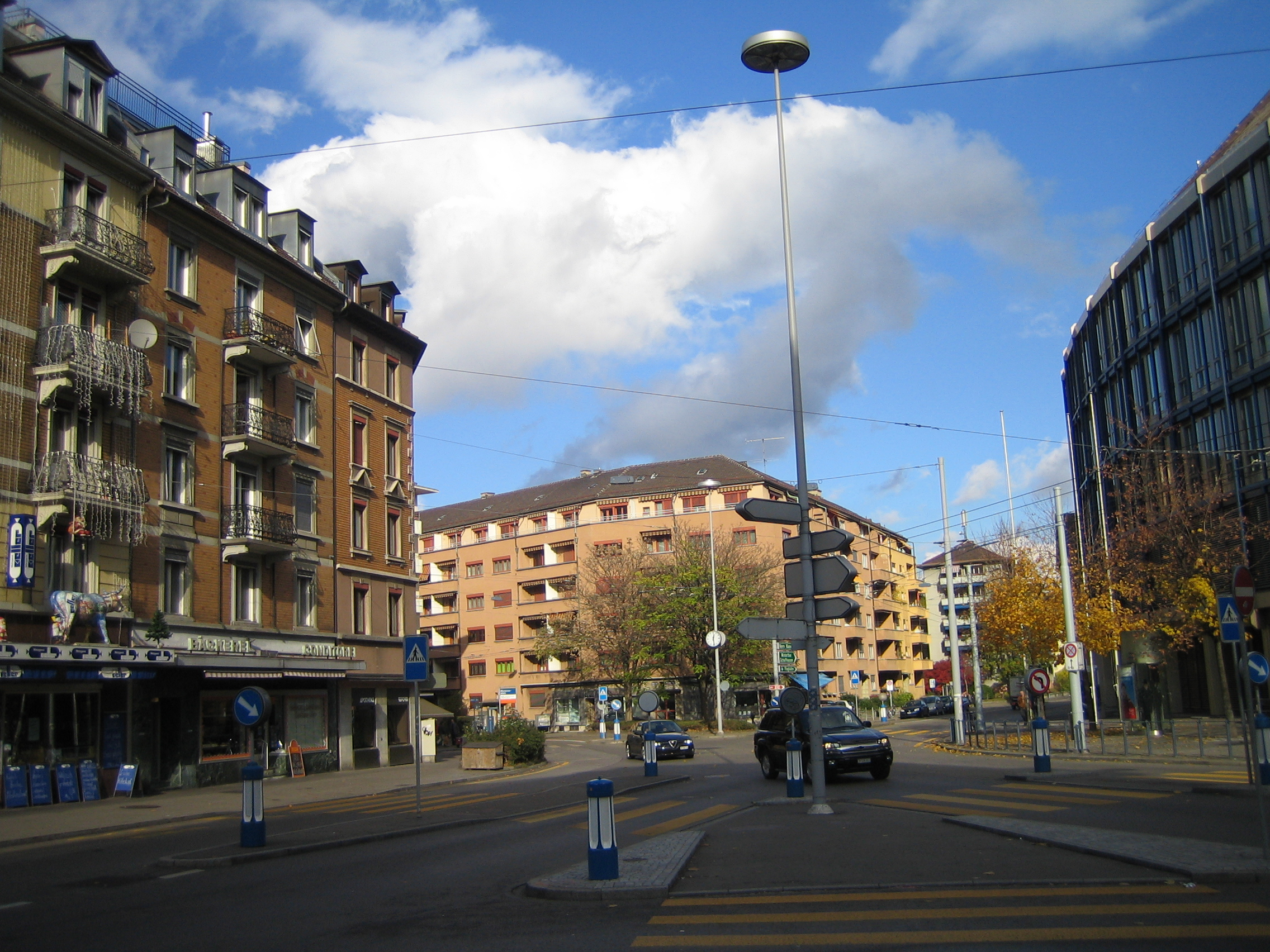 Der Manesseplatz liegt im Stadtkreis Wiedikon in Zürich, Kreis 3, zwischen dem Uetliberg und dem Zürichsee. Hier ein Stimmungsbild. - Foto: Jakob Vetsch, 18. November 2006.